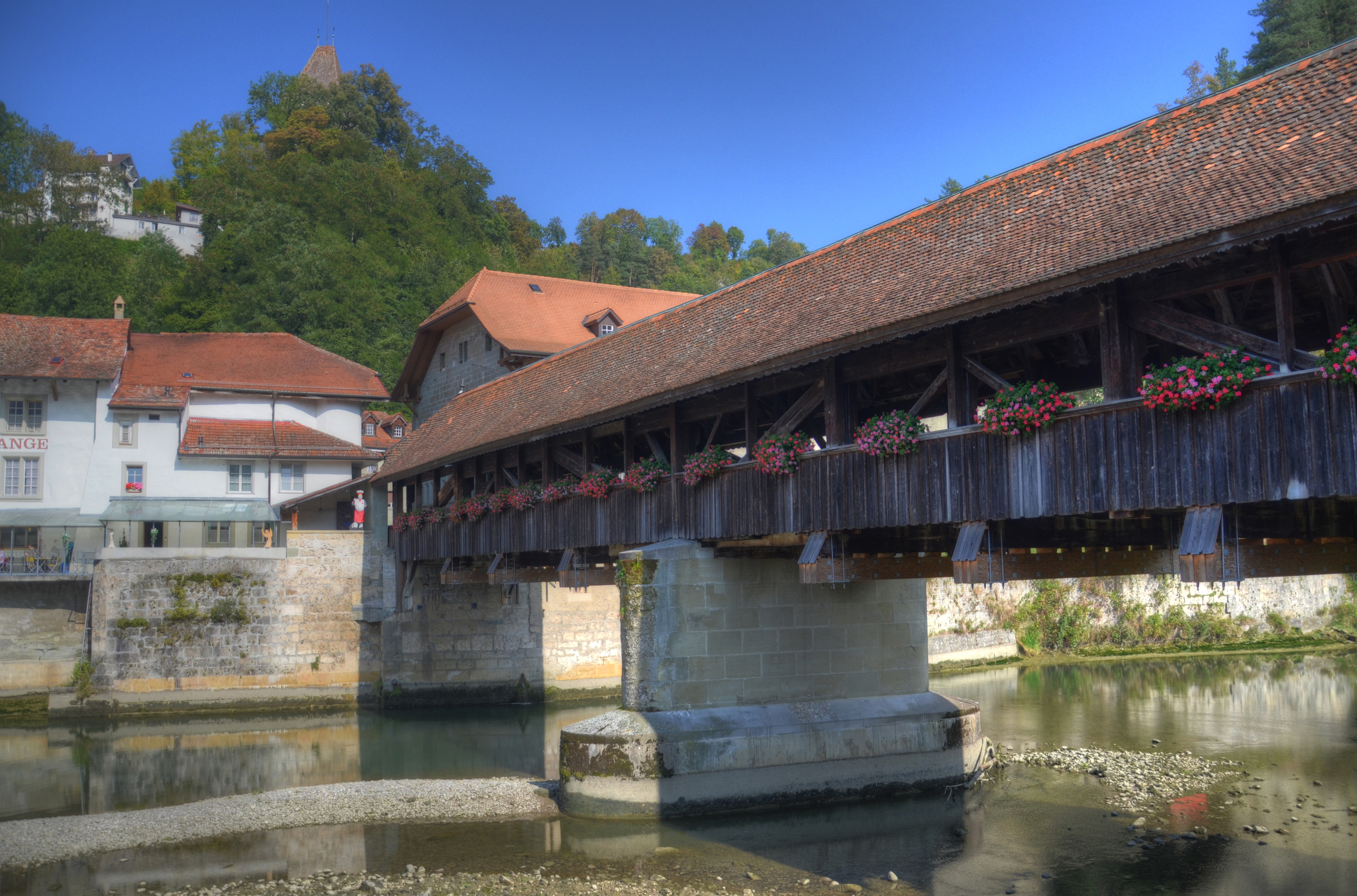 Die Bernbrücke über die Sahne in der Freiburger Altstadt